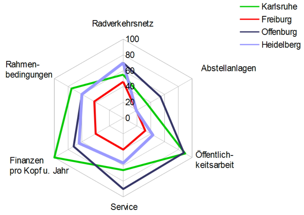 Rad-Verkehrspolitik Heidelberg